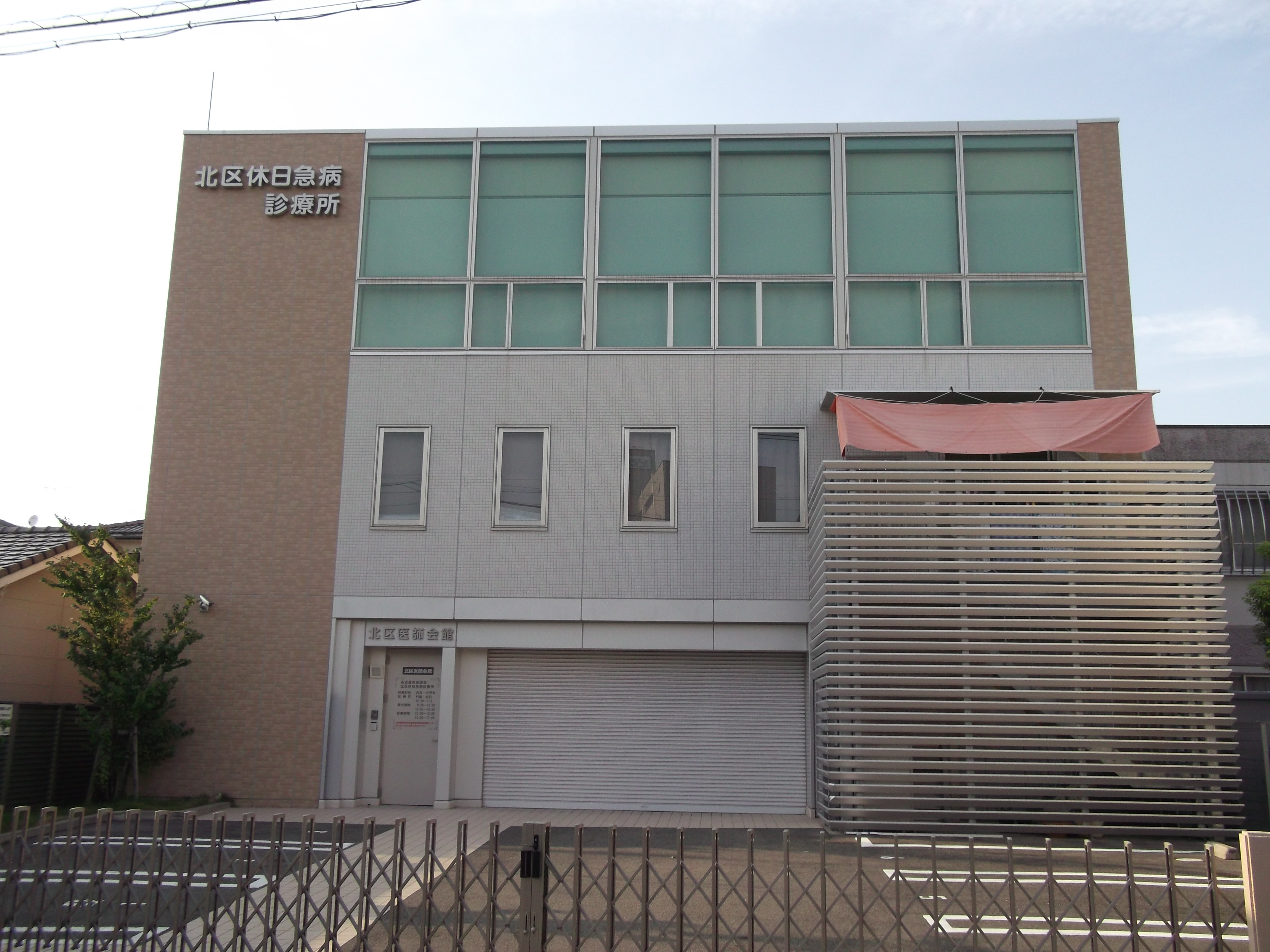 名古屋市北区下飯田町に所在する北区休日急病診療所を南側公道より撮影